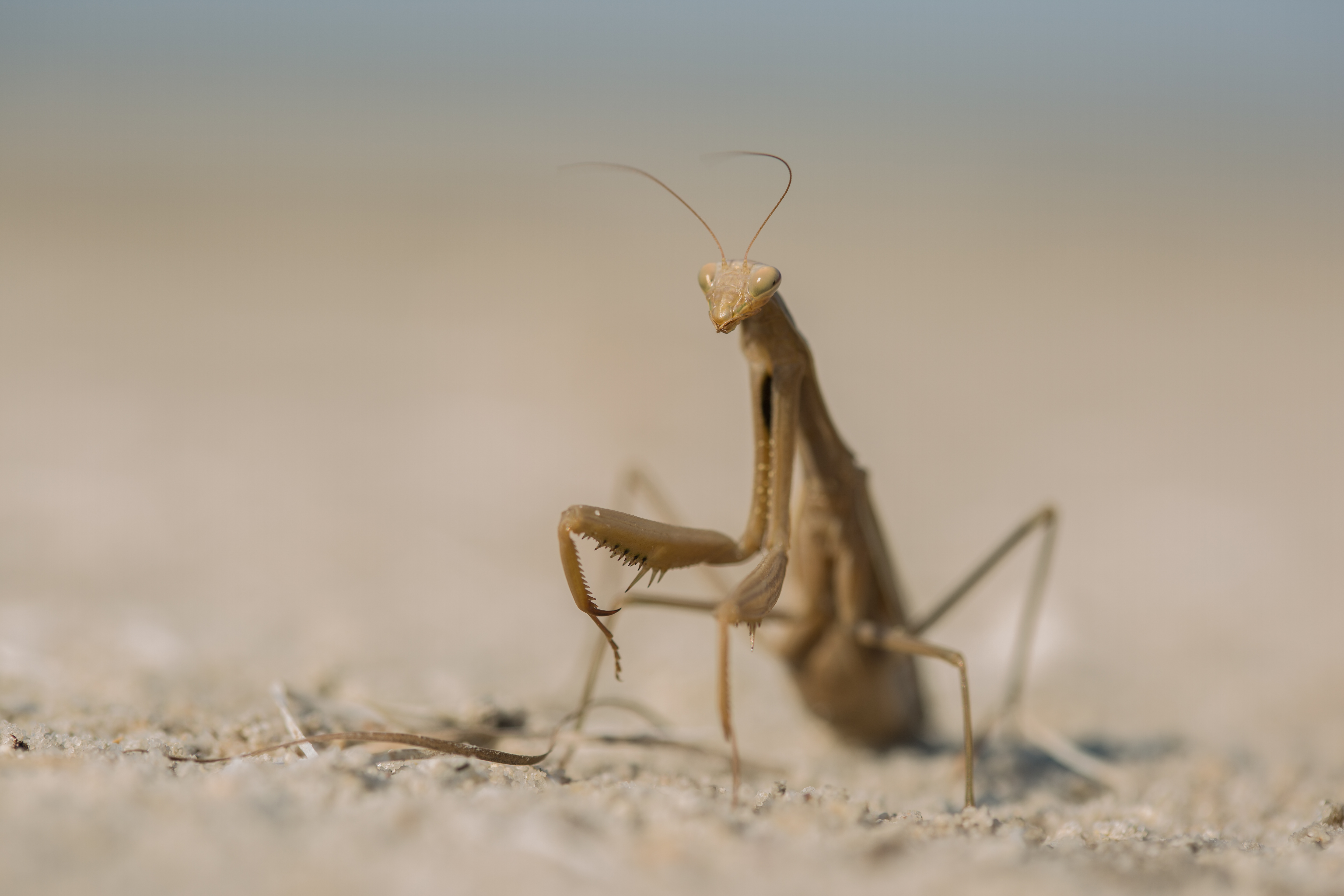 Знято під час експедиції на о. Джарилгач This photo/video of Dzharylhach was taken during Wikiexpedition to Dzharylhach supported by Wikimedia Ukraine. You can see all photographs in category Category:Wikiexpedition to Dzharylhach. English | українська | +/−